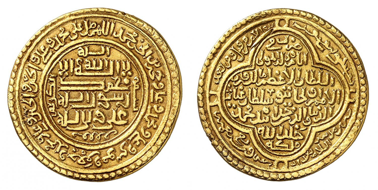 سكَّة الإلخان المغولي أولجايتو مُحمَّد خُدابنده وقد ضُربت عليها عبارات التشيُّع لِأهل البيت (يسارًا): الله لا إله إلَّا الله مُحمَّد رسول الله عليٌّ وليُّ الله (في الوسط)؛ اللهُمَّ صلِّ علی مُحمَّدٍ وعليٍّ والحسن والحُسین وعليّ ومُحمَّد وجعفر وموسی وعليّ ومُحمَّد وعليّ ومُحمَّد بن الحسن (في الحاشية). وعلى اليمين يظهر في الوسط: ضُرب في أوامره المولی السُلطان الأعظم مالك الأطهر أولجايتو سُلطان غیَّاث الدُنیا والدین مُحمَّد خلَّد الله مُلکه